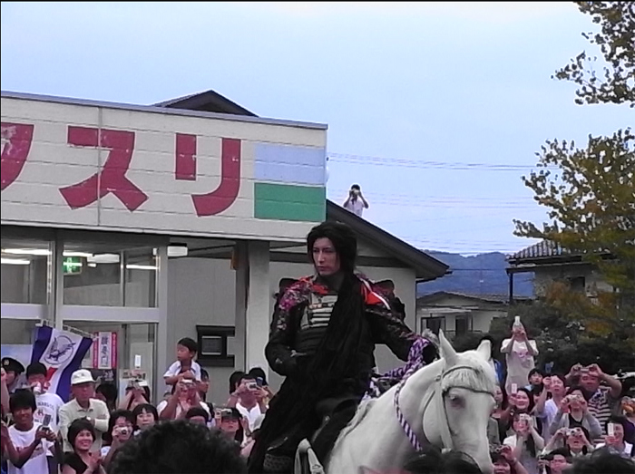 Gackt